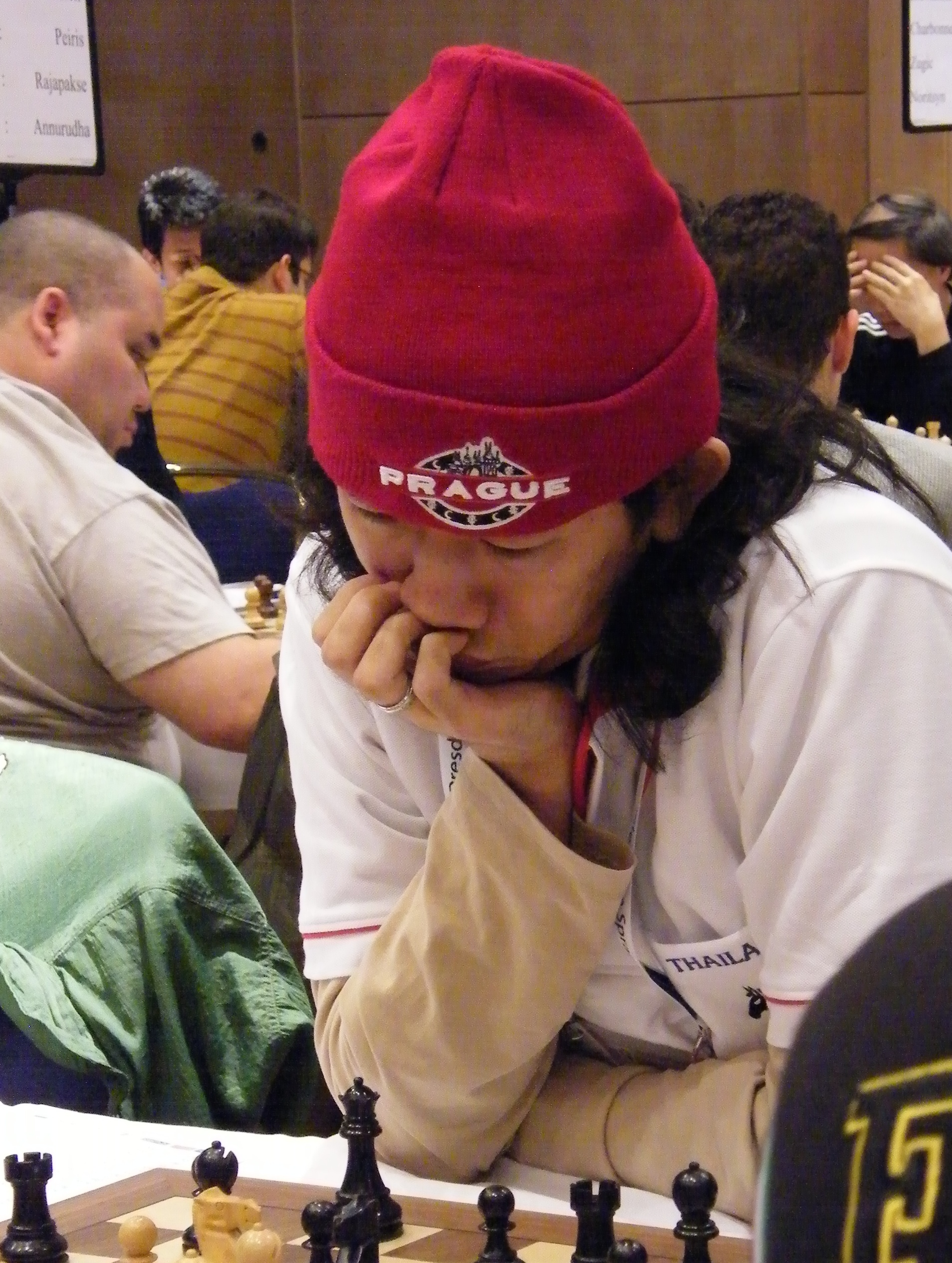 Atippat Pornariyasombat bei der 38. Schacholympiade in Dresden 2008